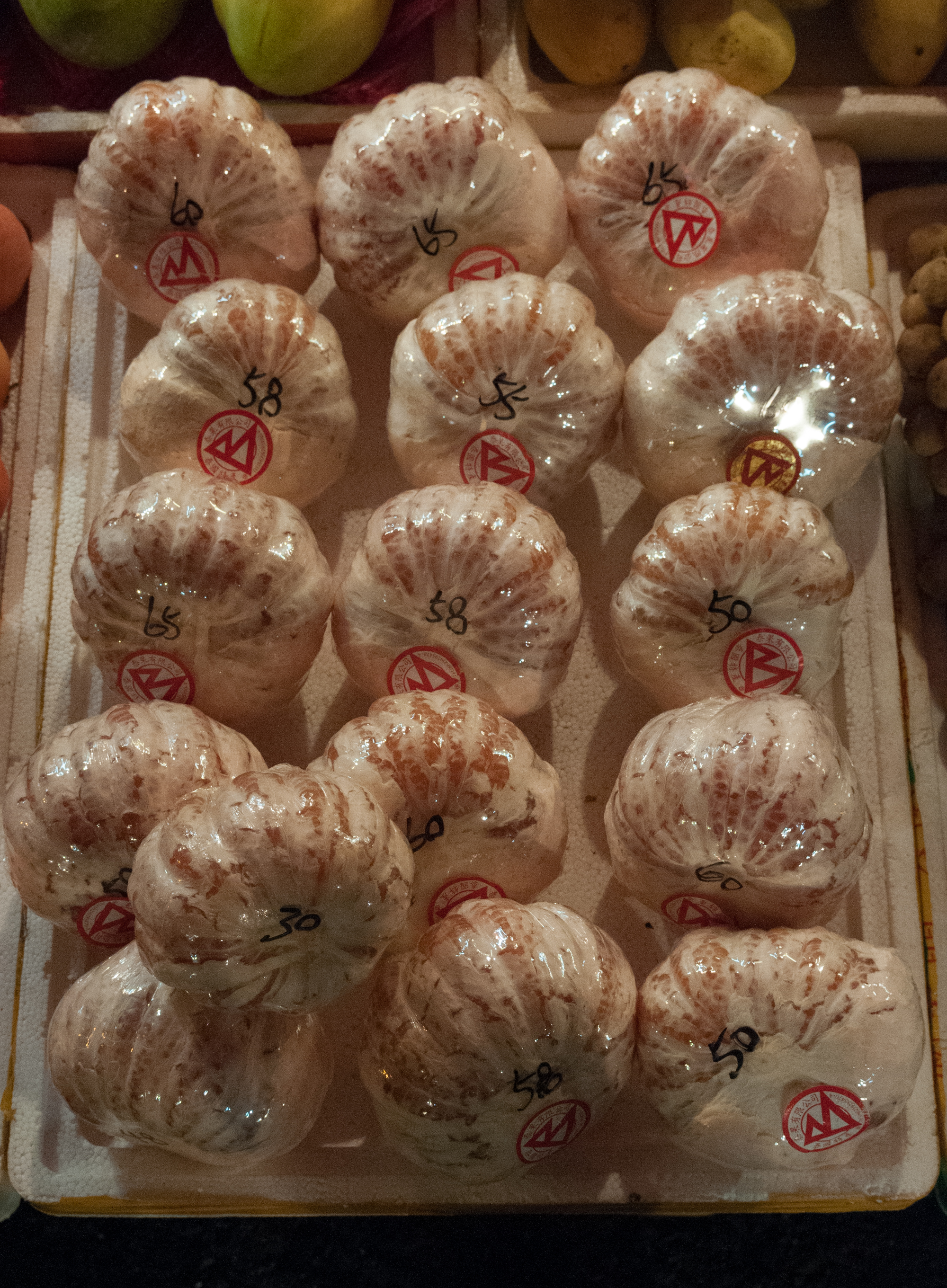 Citrus maxima on Hong Kong Market[1]